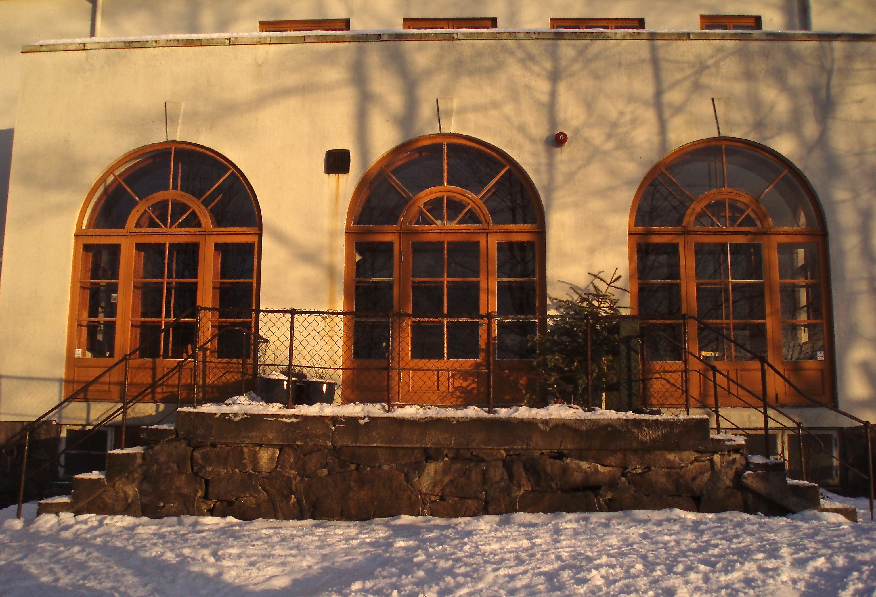 Detalj fra barnehjemmets vestside.